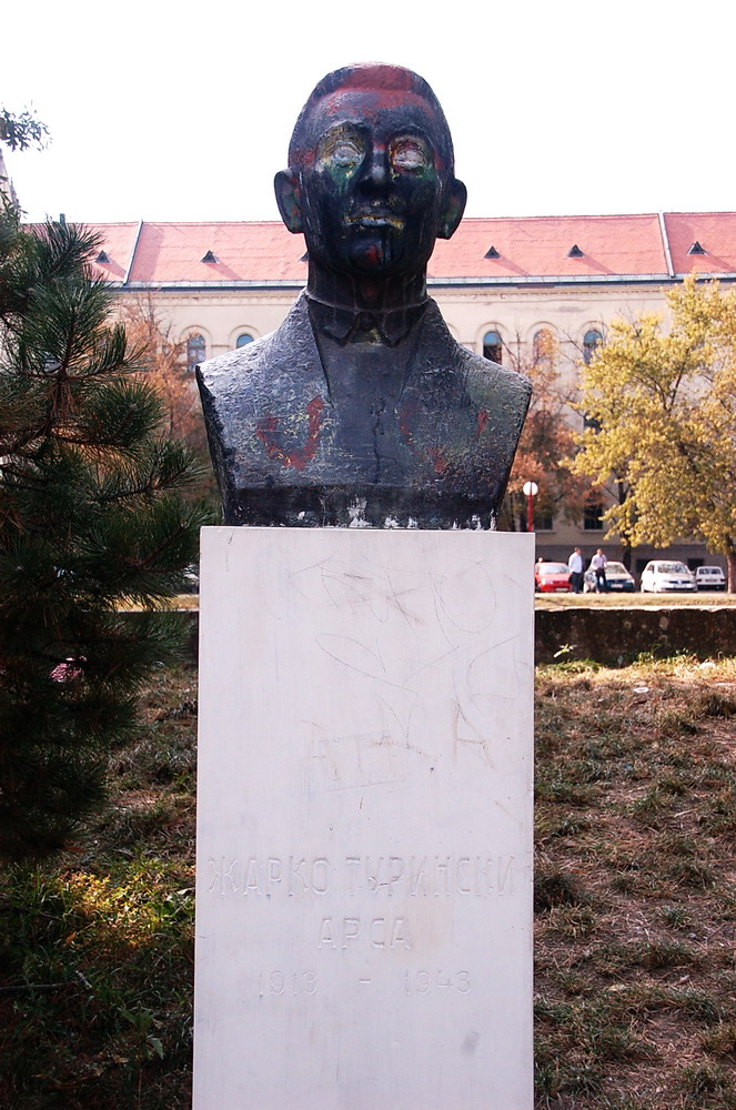 Биста Жарка Туринског Арсе у дворишту ОШ Вук Караџић у Зрењанину.